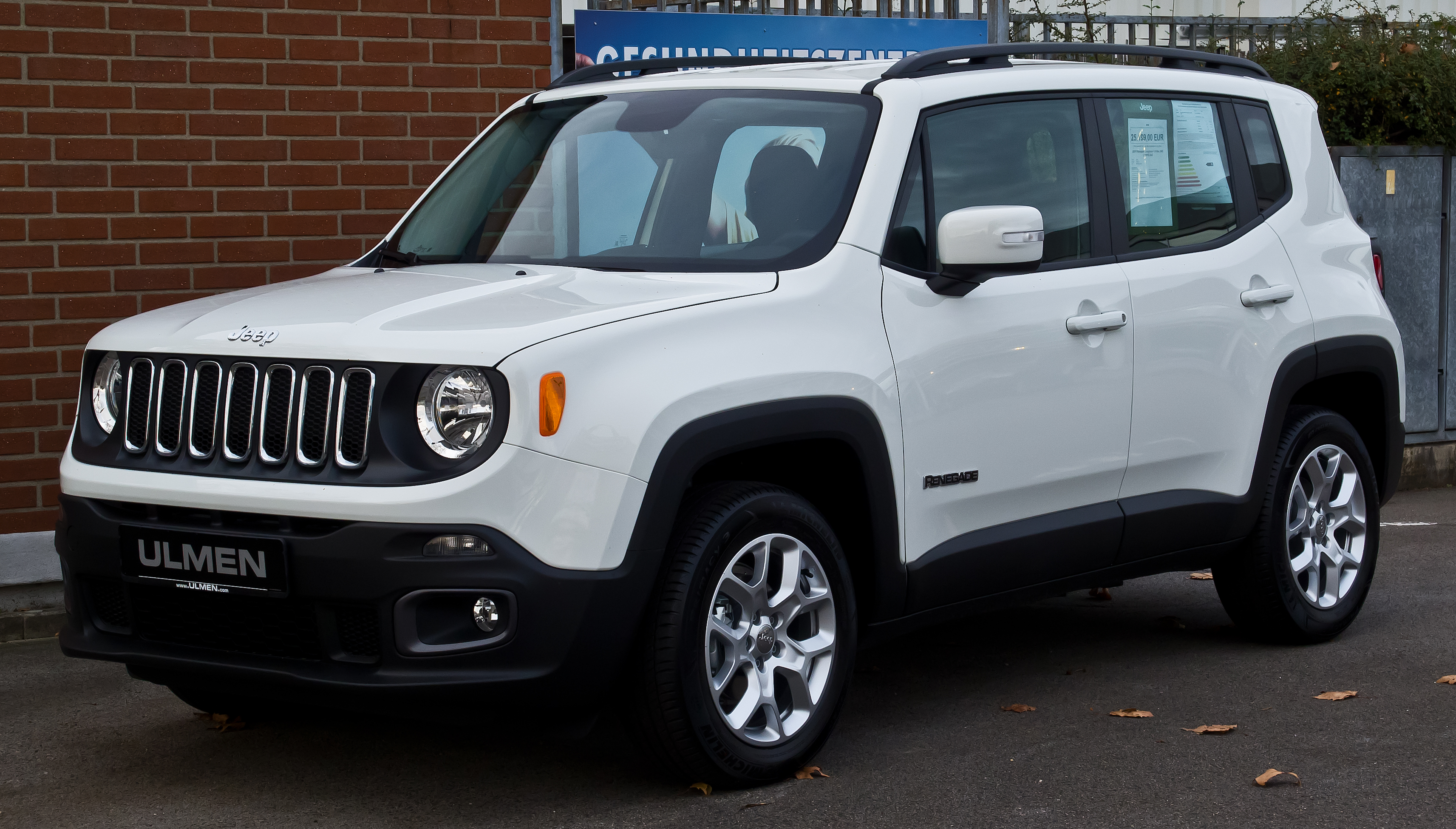 Jeep Renegade 1.6 MultiJet 2WD Longitude